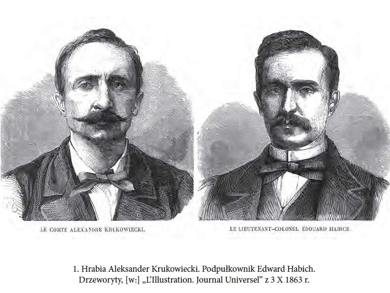 Hrabia Aleksander Krukowiecki i Podpułkownik Edward Habich, uczestnicy powstania styczniowego 1863